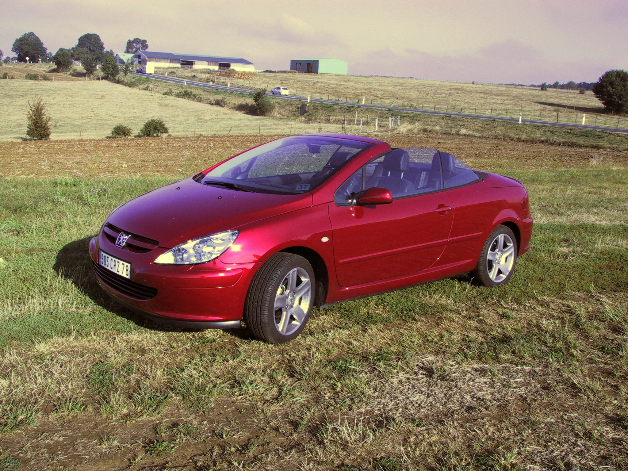 Peugeot 307cc